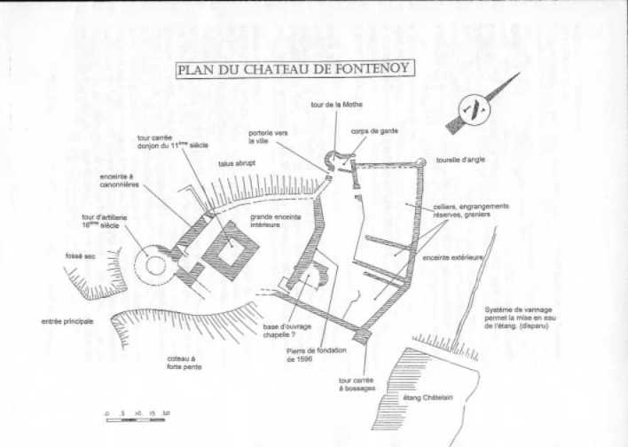 plan annoté du château